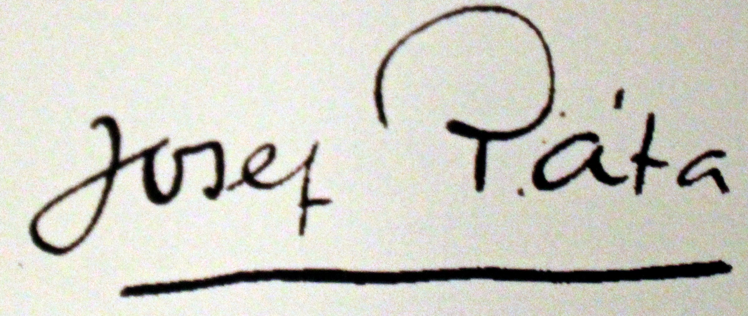 Hornjoserbsce: Podpismo Josefa Páty z hóstneje knihi Maćicy Serbskeje.